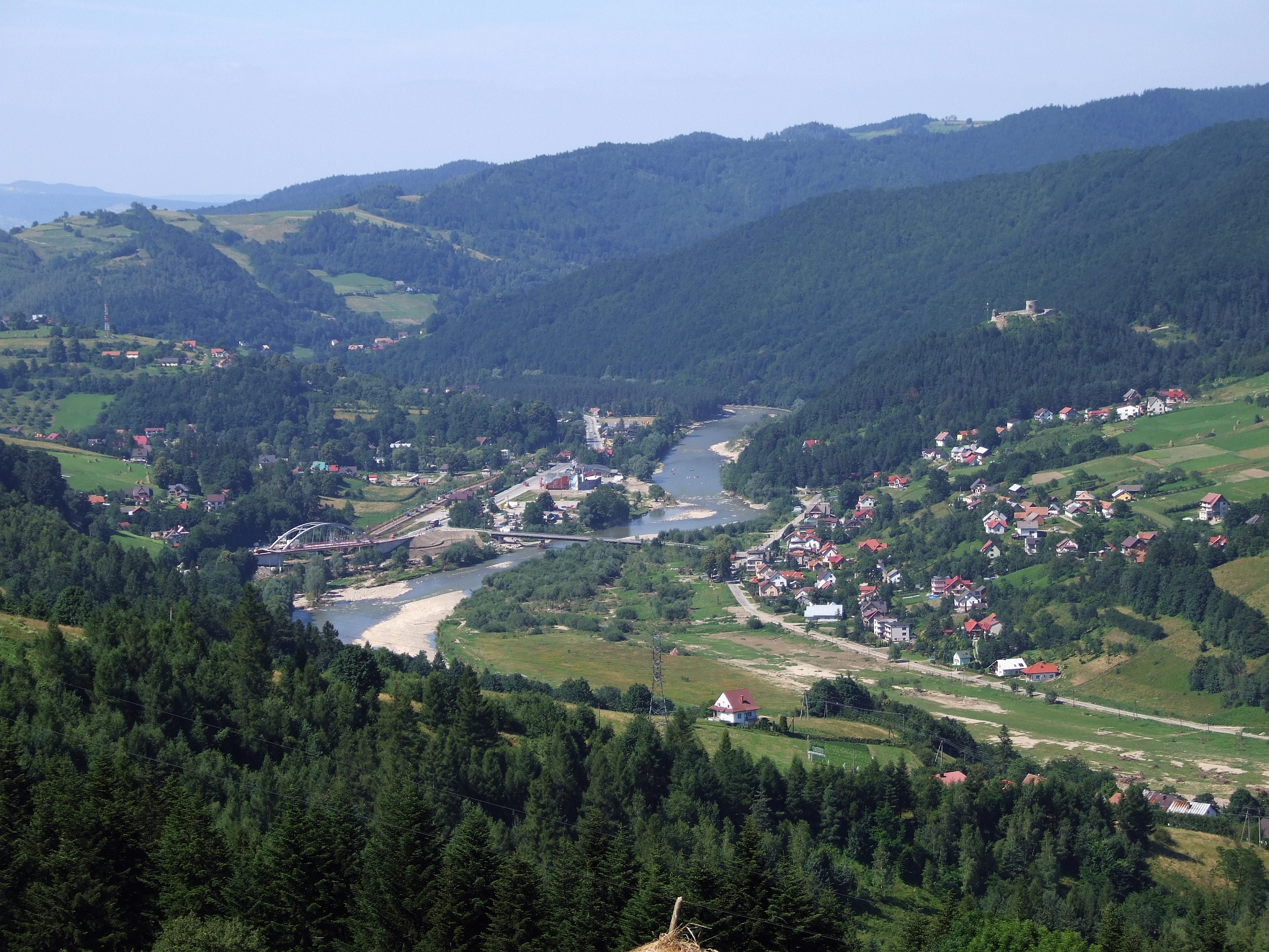 Rytro, Sucha Struga i rzeka Poprad. Widok ogólny z podejścia na Kordowiec z Młodowa